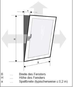 Anschauliches Erläuterung für die Berechnung von Nachströmöffnungen bei gekippten Fenstern.